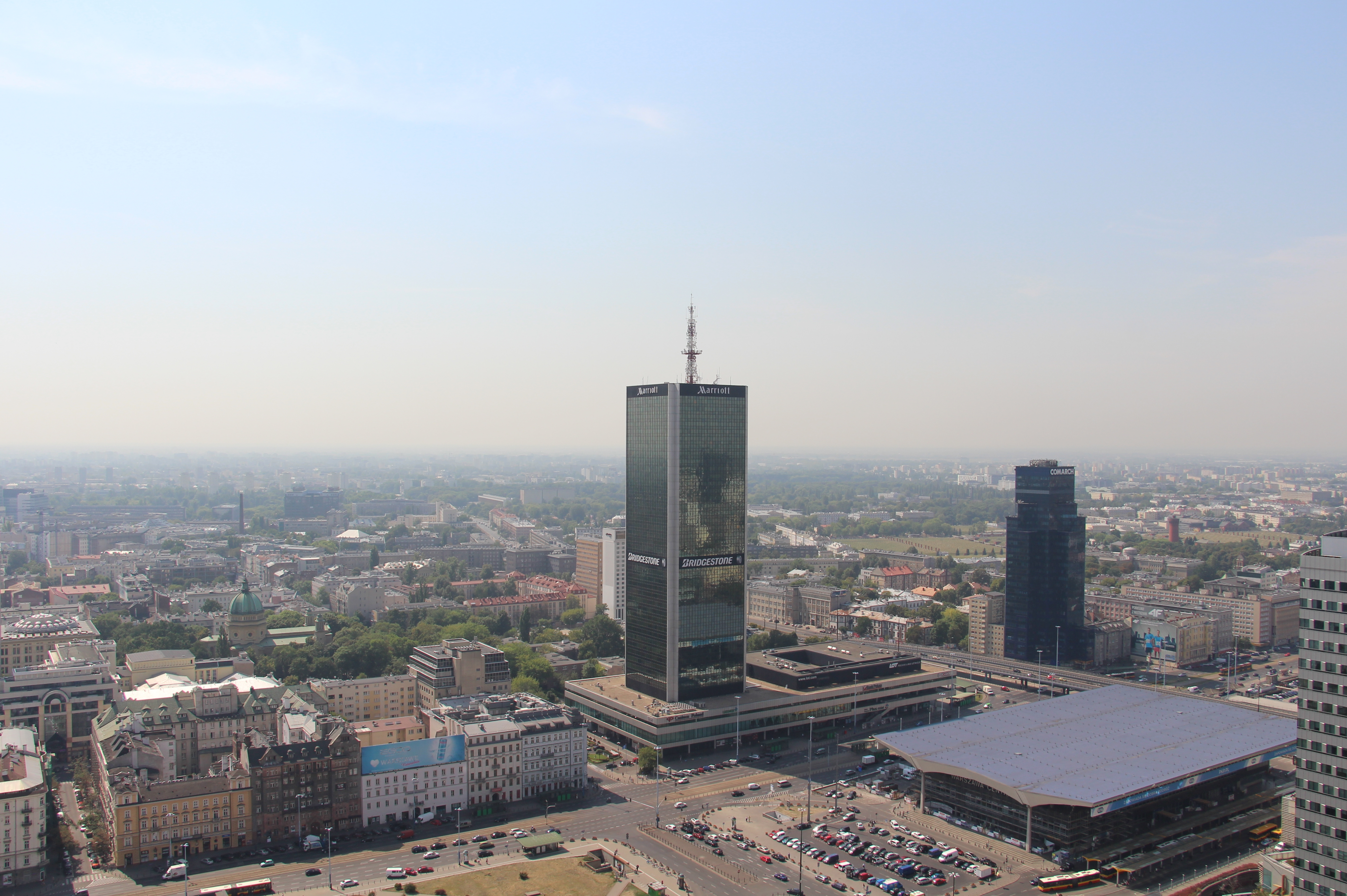 Śródmieście Południowe. Aleje Jerozolimskie Marriott International Hotel, offices and retail. Arch. Jerzy Skrzypczak, Andrzej Bielobradek, and Krzysztof Stefanski 1987-89. Warsaw central railway station. Arch. Arseniusz Romanowicz 1972-75. View from Palace of Culture and Science's terrace